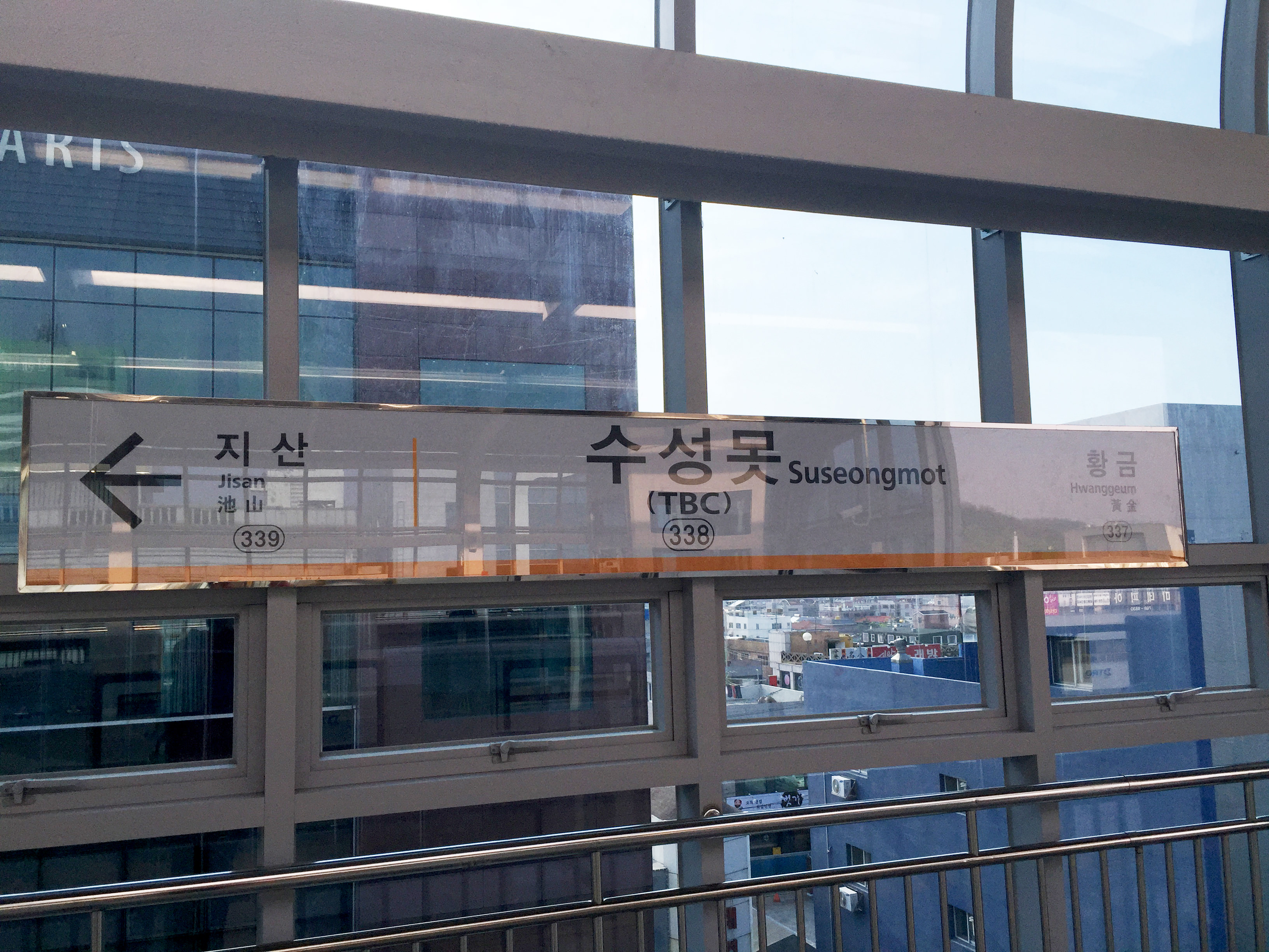 수성못(TBC)역 역명판